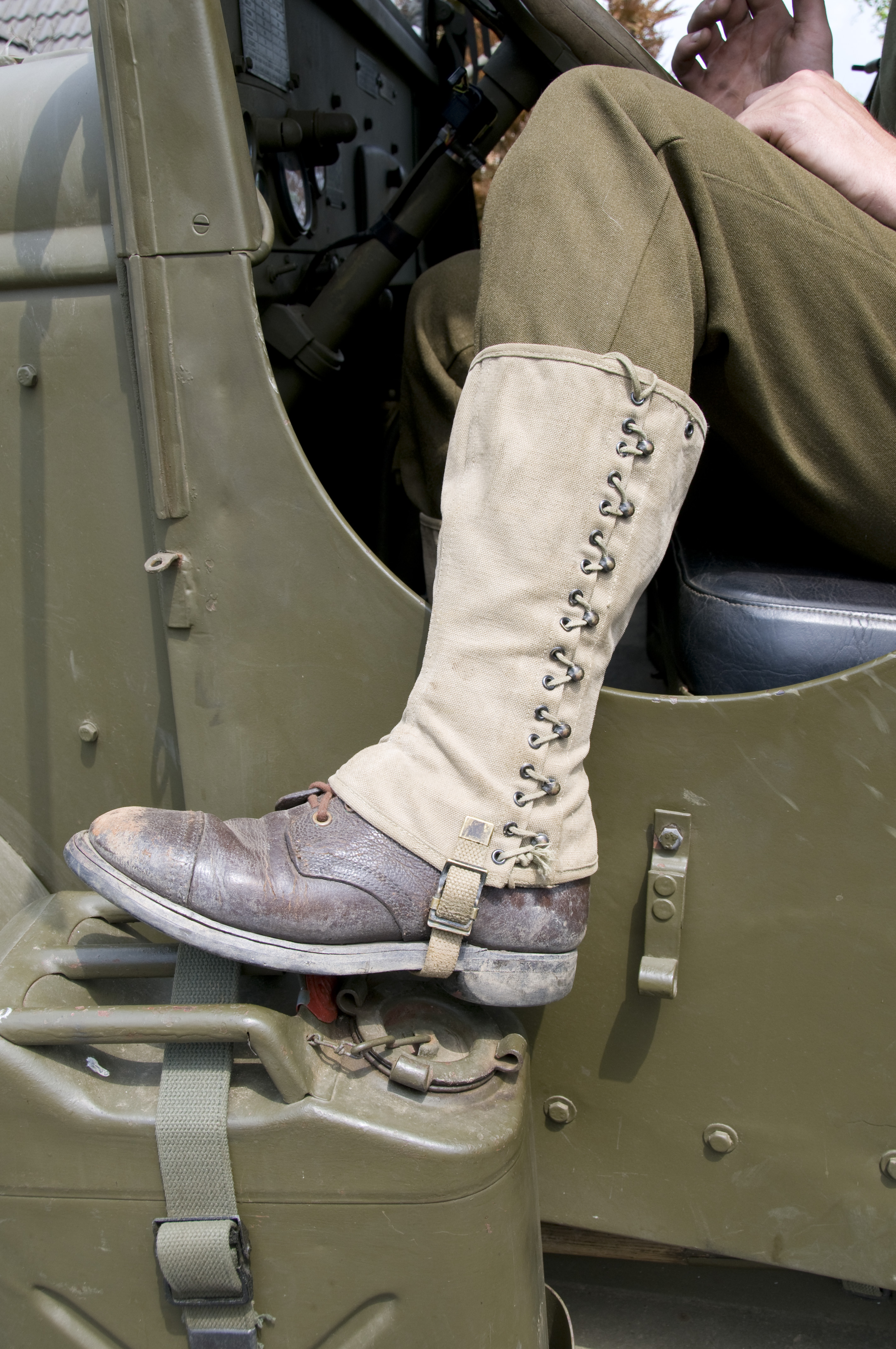 Zaldotegett.